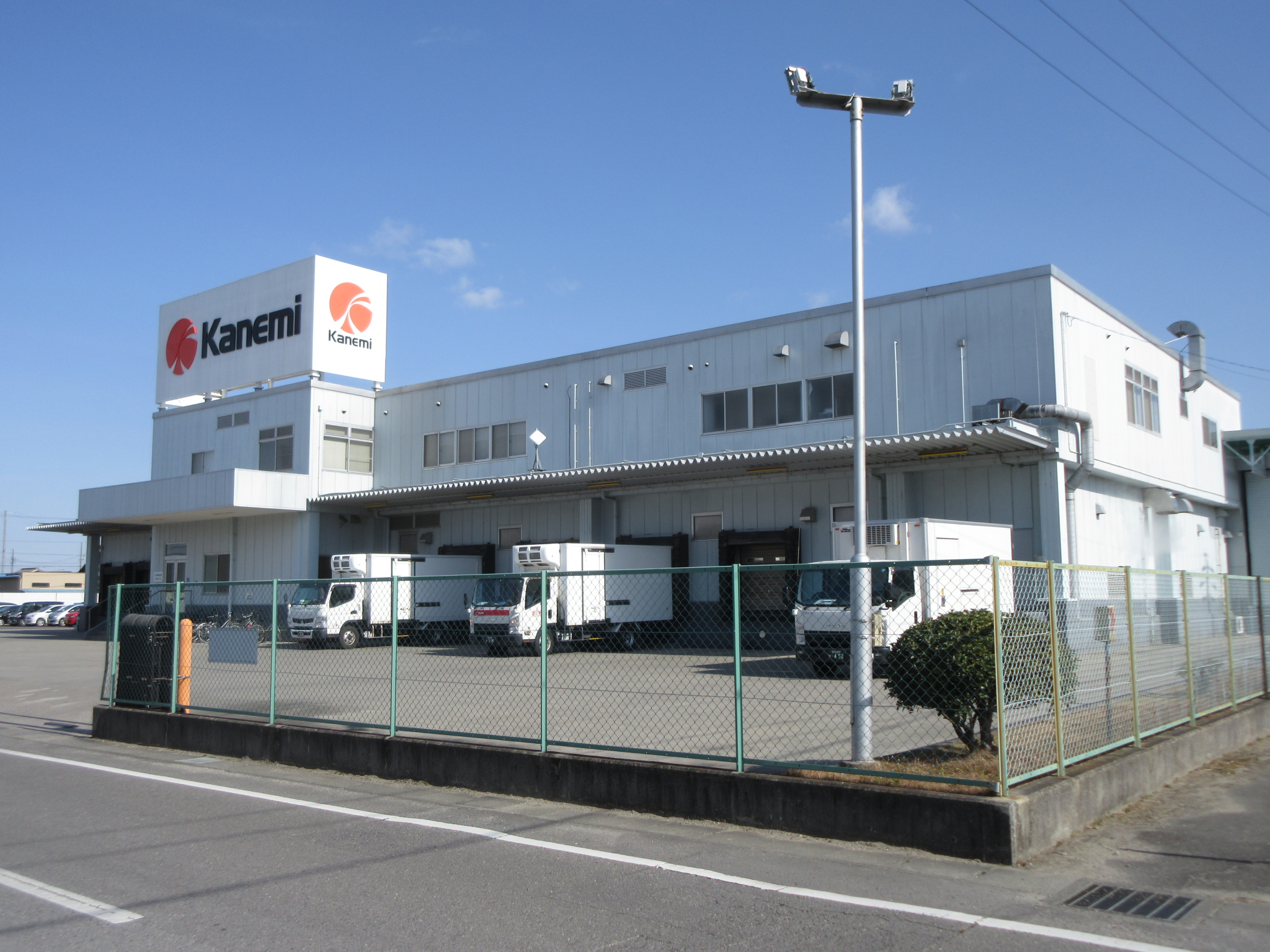 カネ美食品岡崎工場（愛知県岡崎市高橋町）